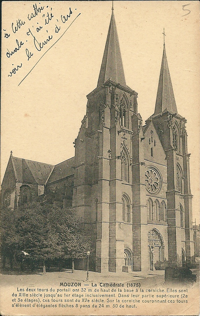 Mouzon (Ardennes - France) - La basilique - en 1875